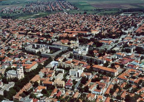 Kiskunfélegyháza, Hungary, aerial photography